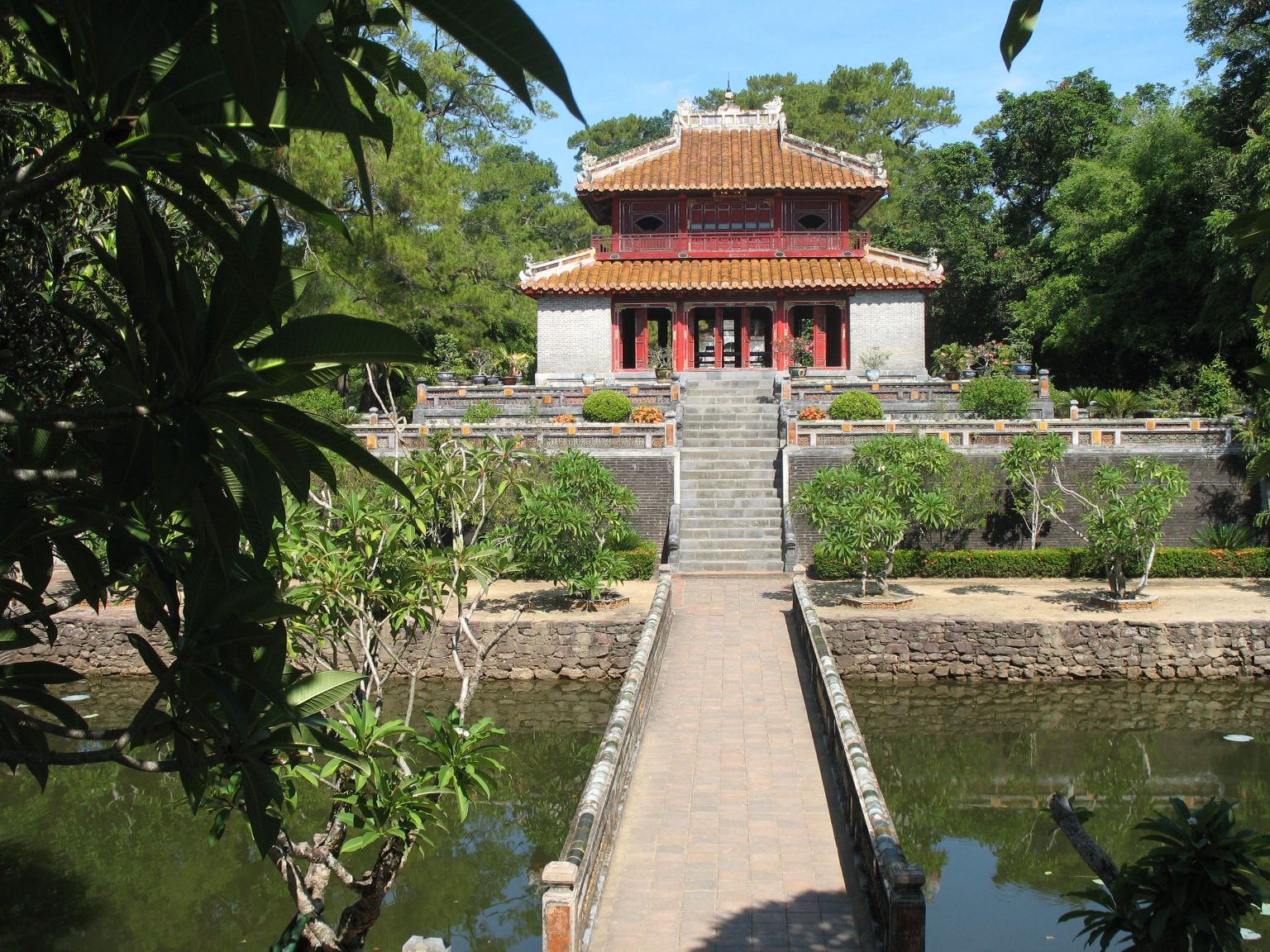 Beim Mausoleum des Königs Minh Mang